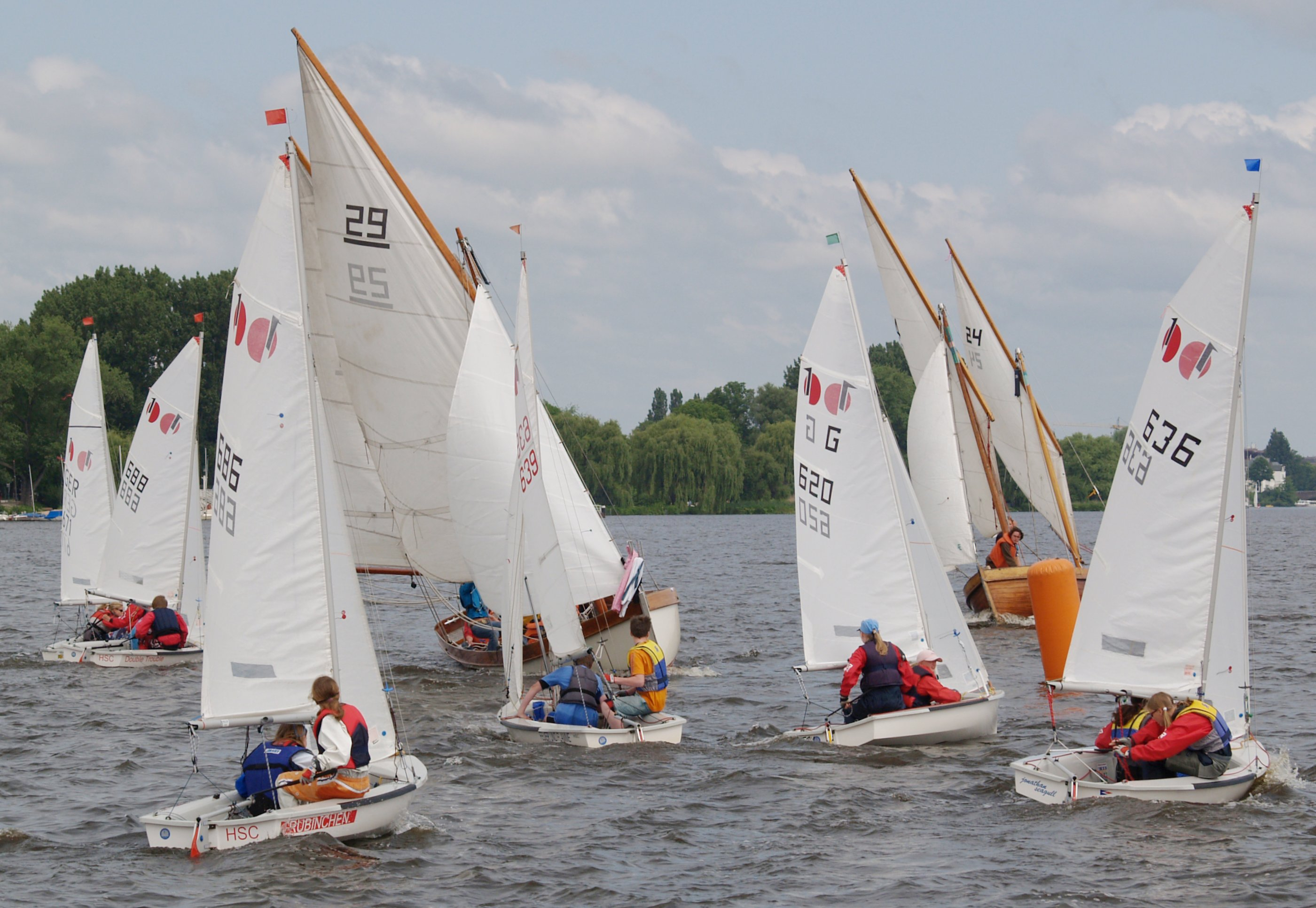 Teeny